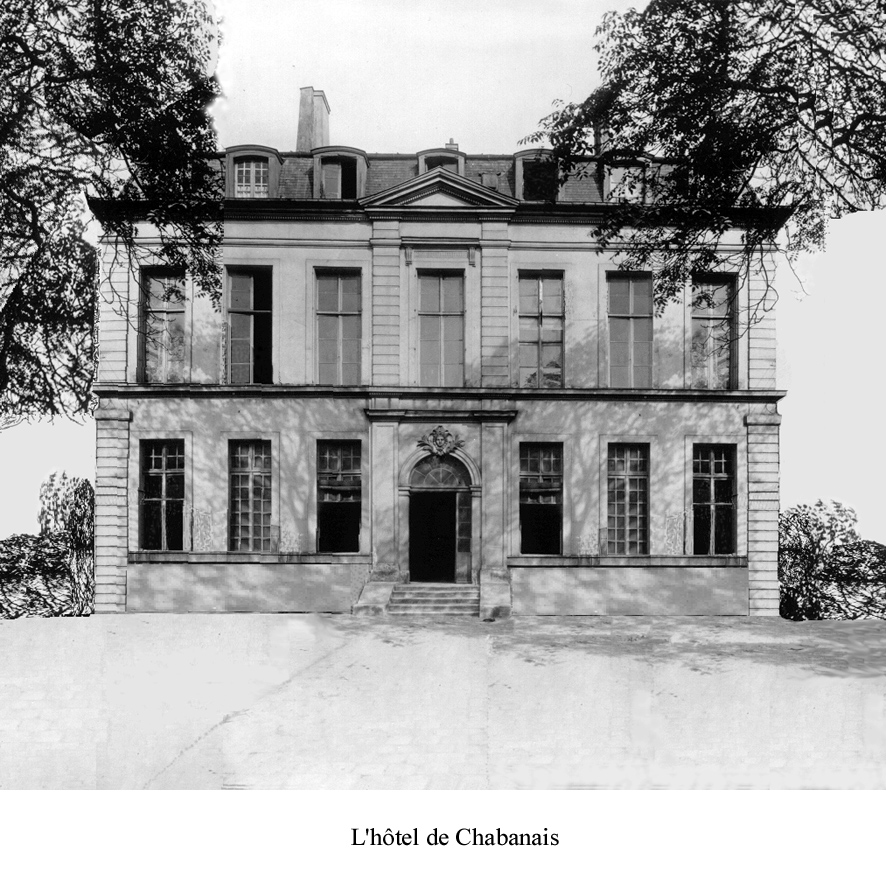 Reconstruction virtuelle effectuée par Frédéric Lenormand, auteur du livre La Pension Belhomme. Libre de droits.